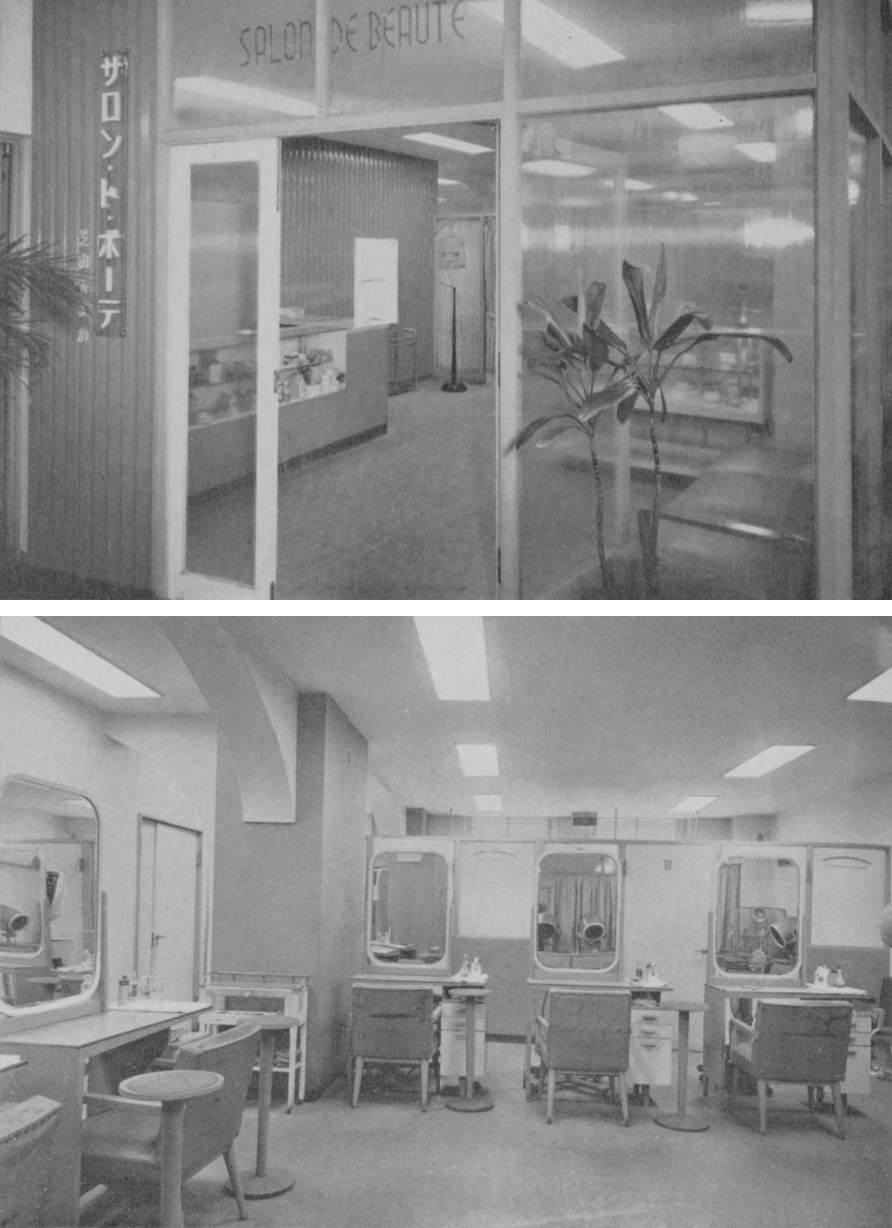 "SALONS DE BEAUTE" (Beauty salons in Matsuzakaya, Ginza)